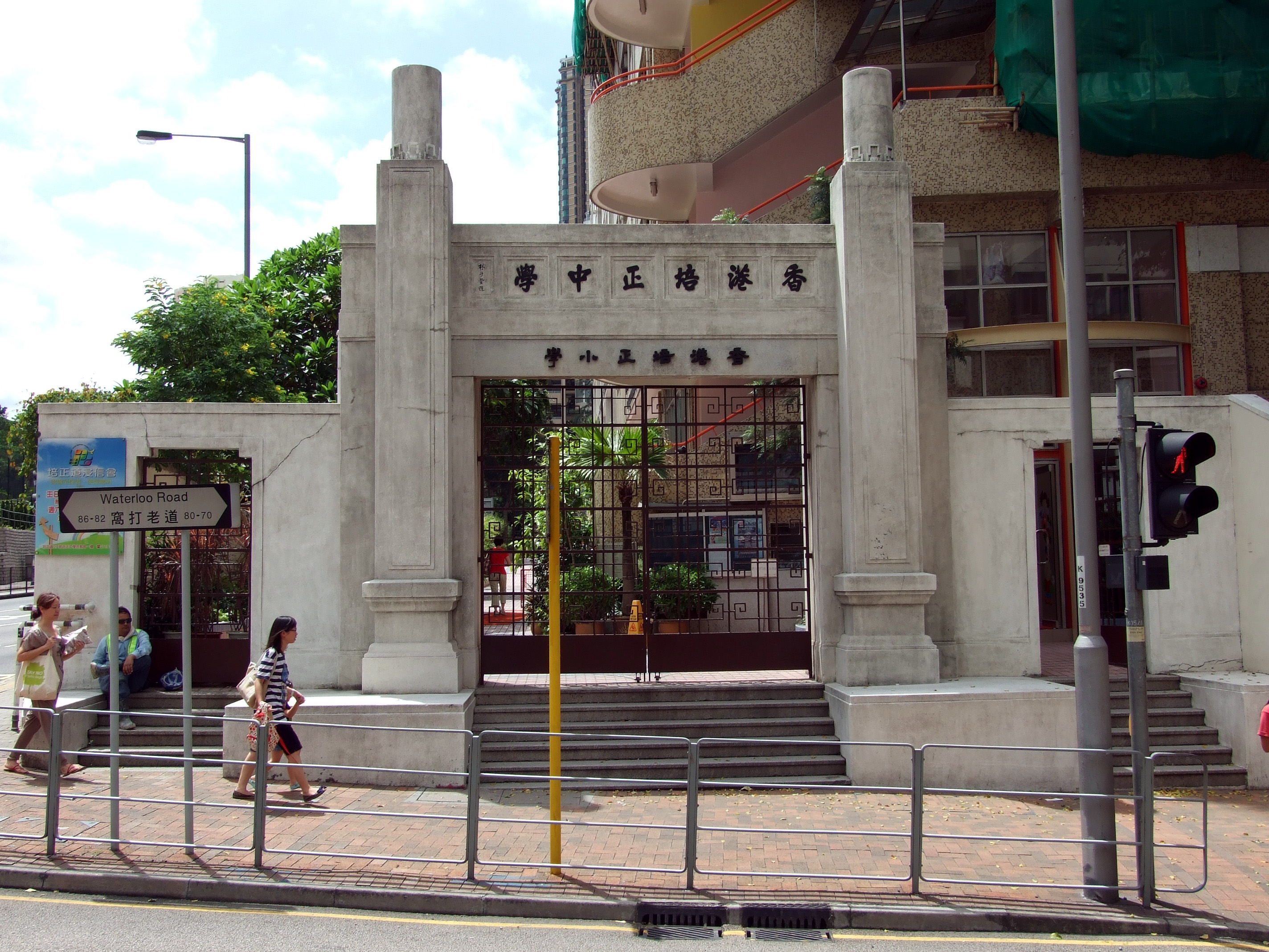 培正小學牌樓